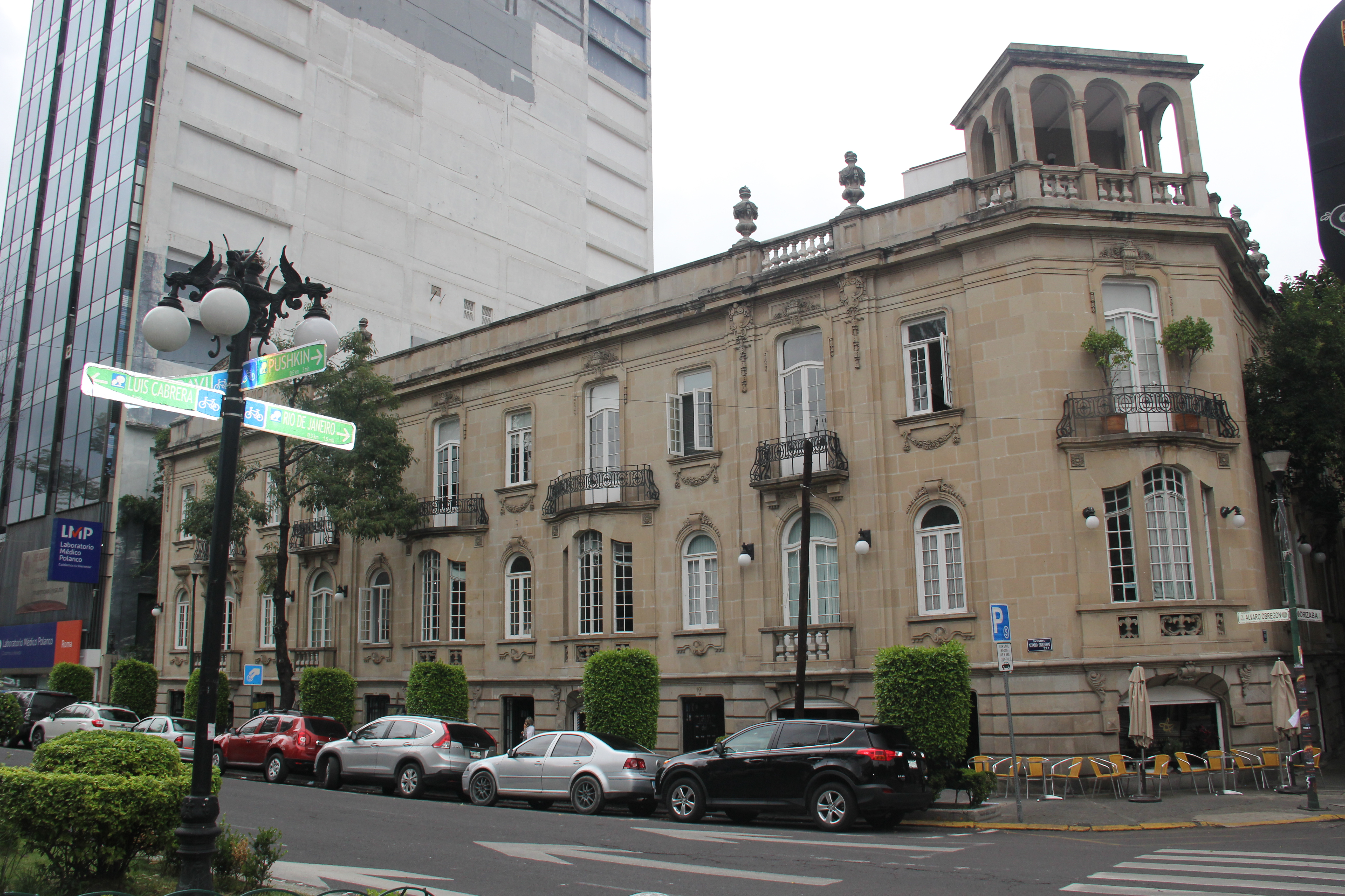 Edificio Balmori visto desde la calle paralela. El edificio tiene rasgos pertenecientes a la arquitectura francesa de los años 20s. El edificio tiene muchas decoraciones como cornisas y detalles en las ventanas. El edificio se encuentra en la Ciudad de México en la Colonia Roma.